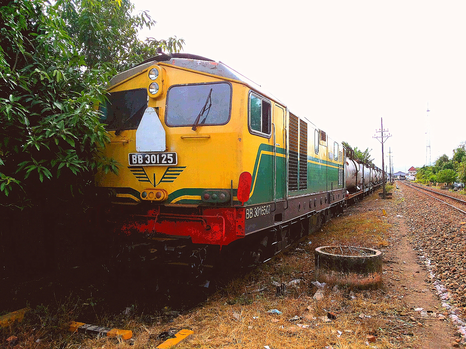 BB 301 25 saat dioperasikan untuk menarik kereta api ketel minyak dari Depo Pertamina Madiun ke Stasiun Madiun atau sebaliknya.